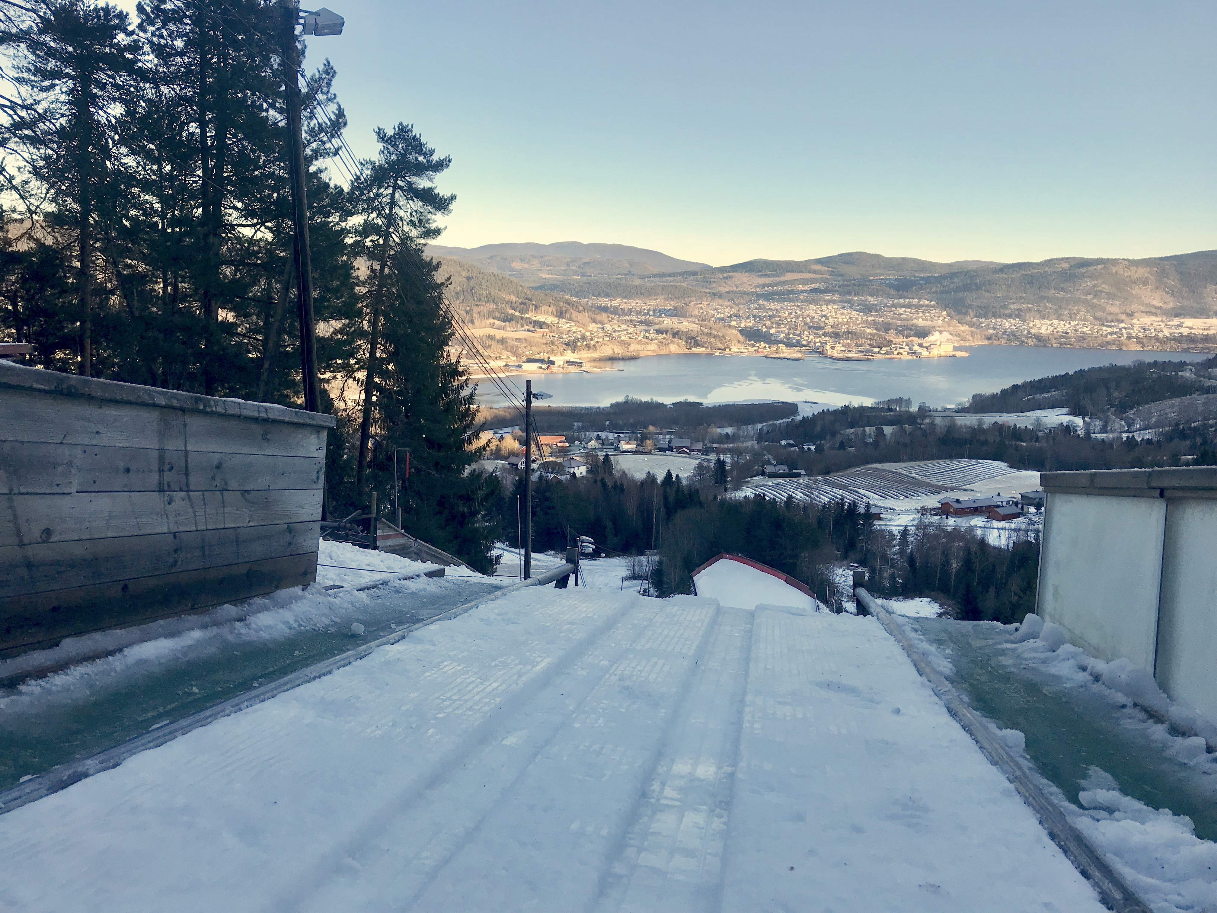 Bildet er tatt nedover, på hoppkanten. Notodden sentrum i bakgrunnen forbi Heddalsvannet